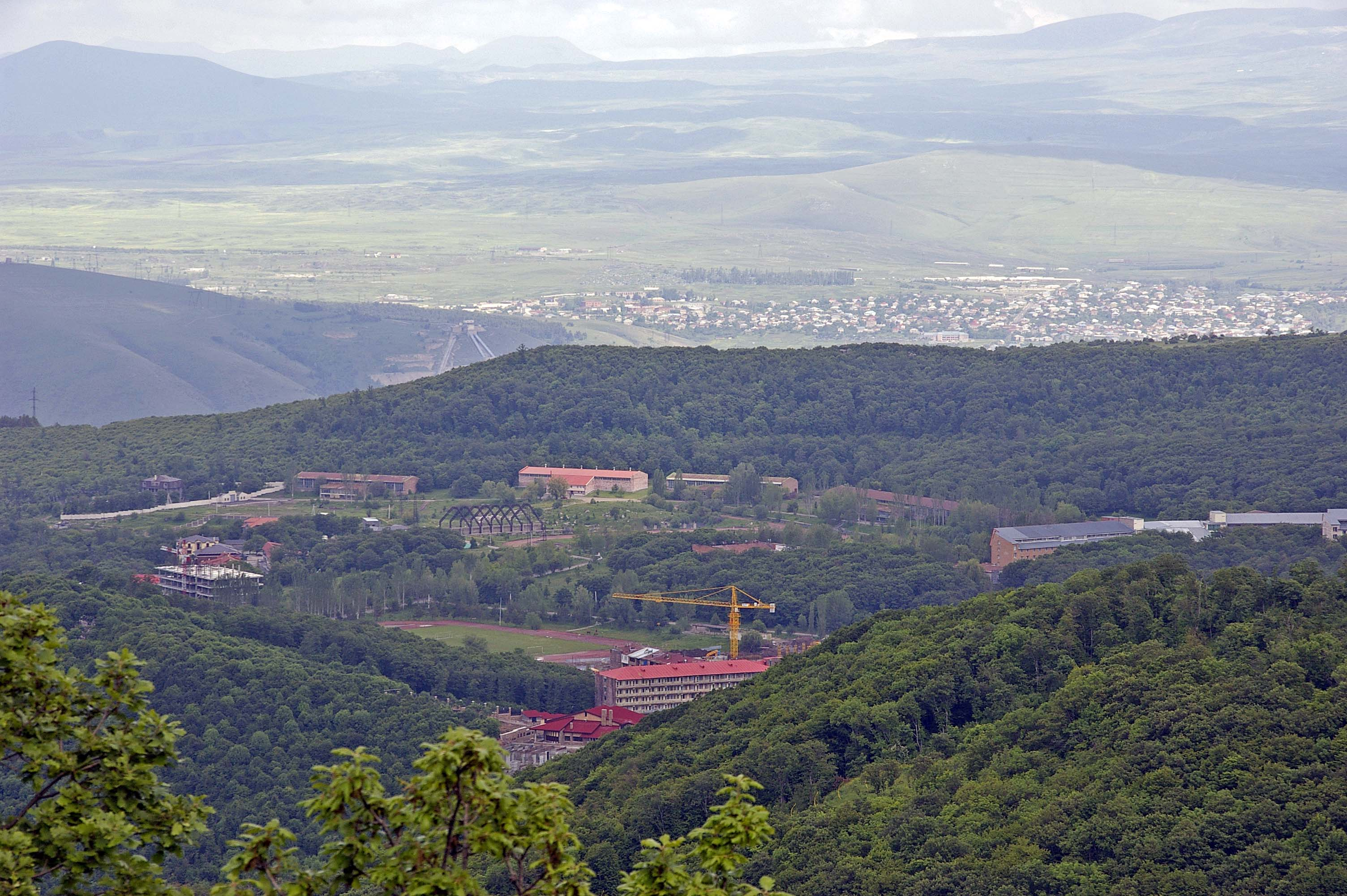 Sicht über Zachadzdor